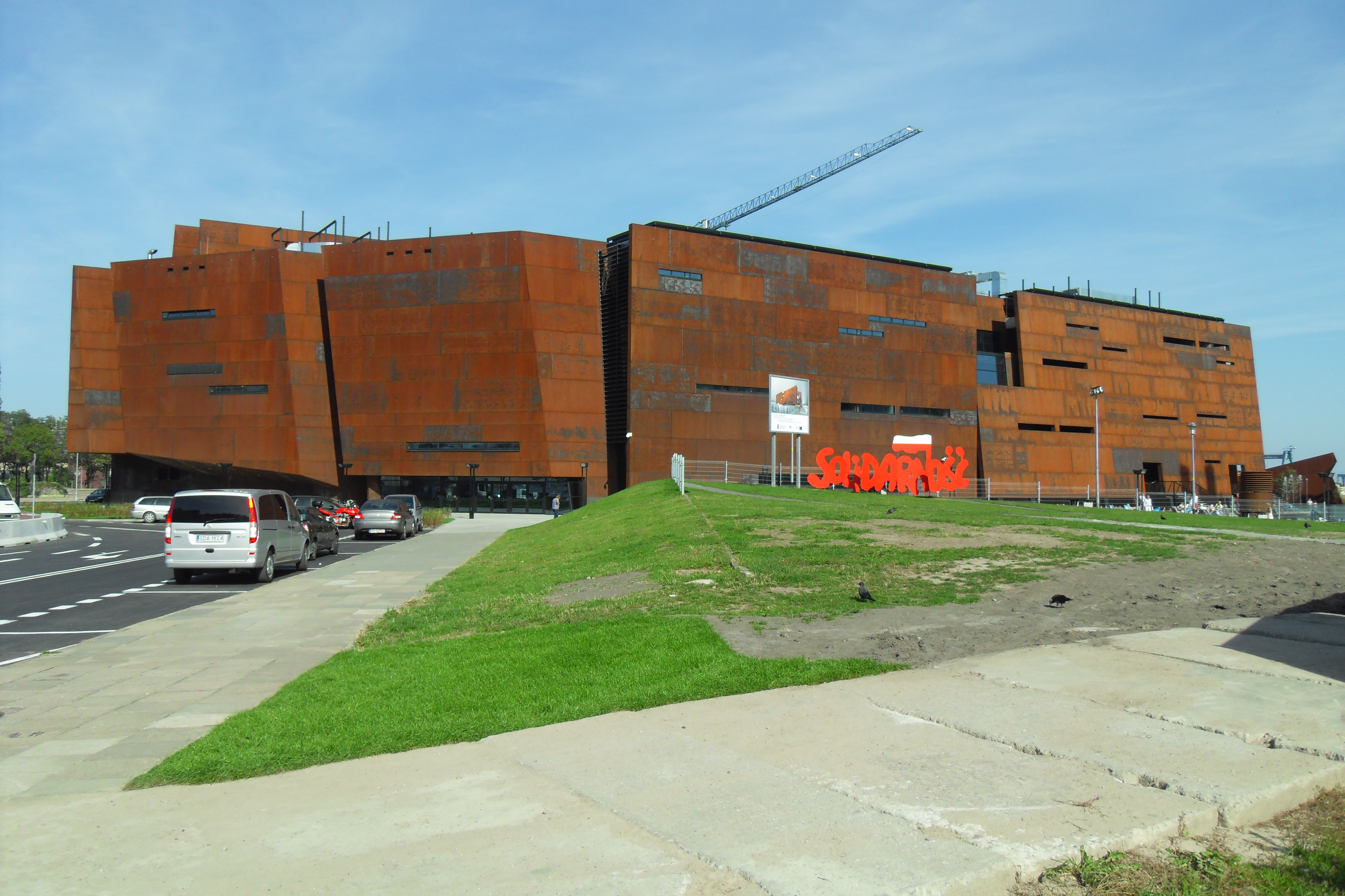 Europejskie Centrum Solidarności w Gdańsku.